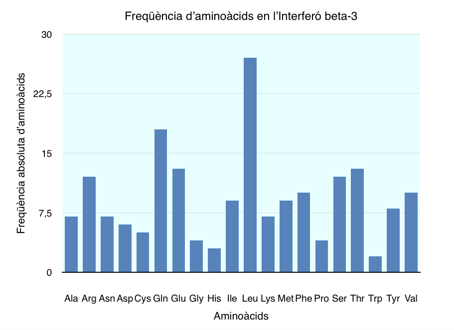 Freqüència absoluta d'aminoàcids de l'interferó beta-3